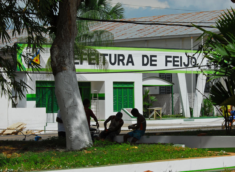 Prefeitura de Feijó - Acre